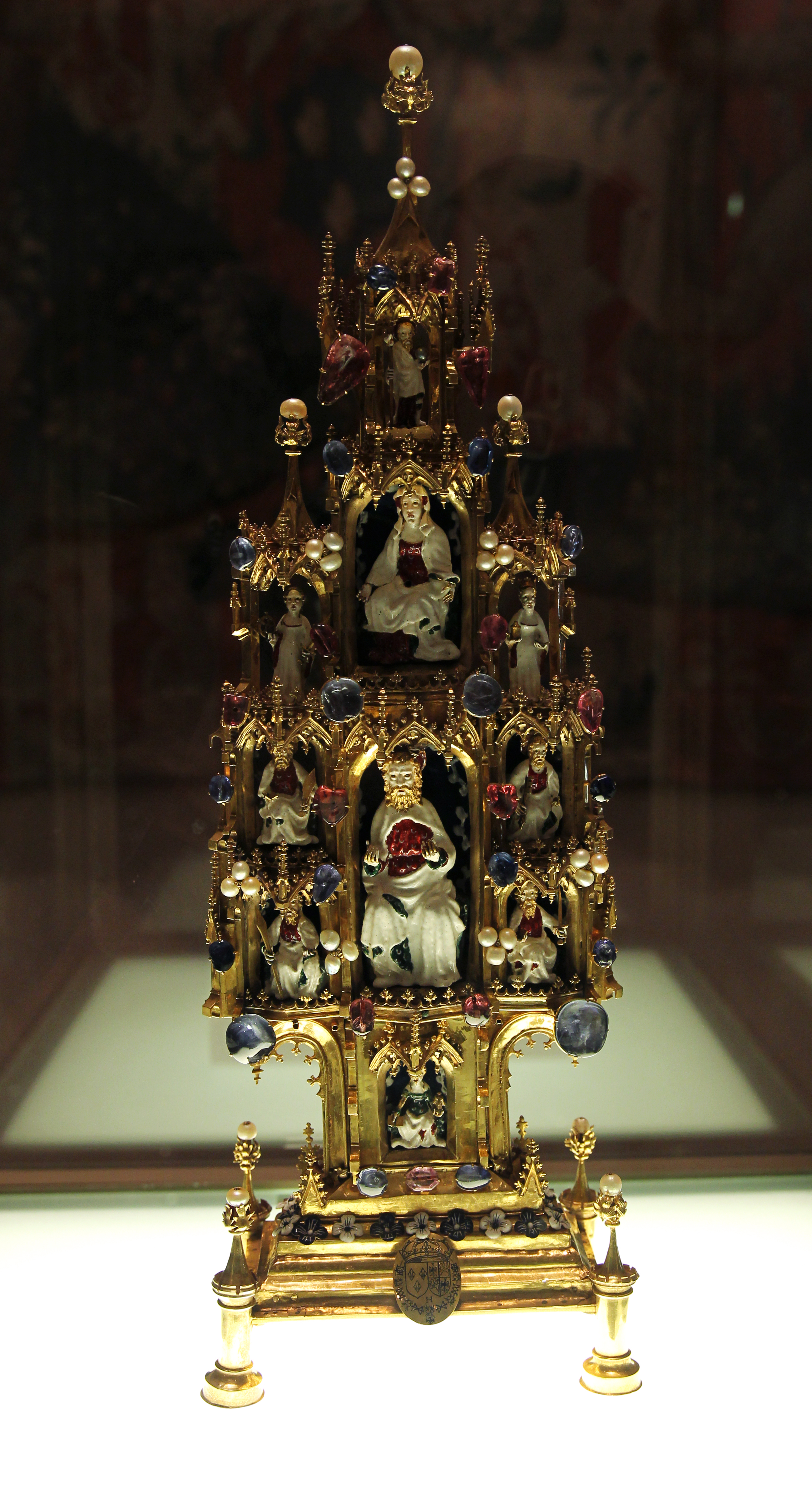 "Tableau de la Trinité" ( détail ), réalisé vers 1412 en Angleterre (?) ou plus vraisemblablement à Paris. Don de Jeanne de Navarre, reine d'Angleterre, à son fils Jean, duc de Bretagne (vers 1412). Passé dans la collection des rois de France, il fut offert par Henri III au trésor de l'Ordre du Saint-Esprit en 1578. Or, émaux sur or en ronde-bosse, perles fines, saphirs, spinelles / rubis balais. Hauteur : 44,5 cm. Largeur : 15 cm. Musée du Louvre, aile Richelieu, salle 504, vitrine 5. Référence : MR552.